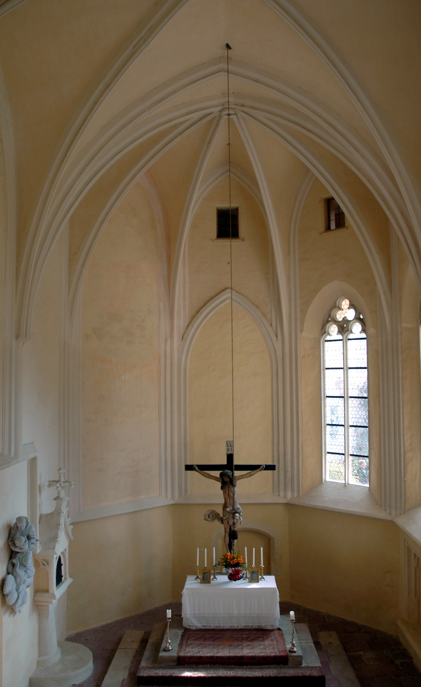 Schrattenthal - Chor der Schlosskapelle Dieses Bild wurde anlässlich des österreichischen Tags des Denkmals 2012 in Niederösterreich eingereicht.